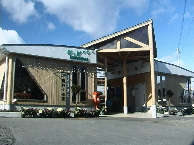 JR加古川線・青野ヶ原駅（兵庫県小野市） 撮影：Cubical quad本人。